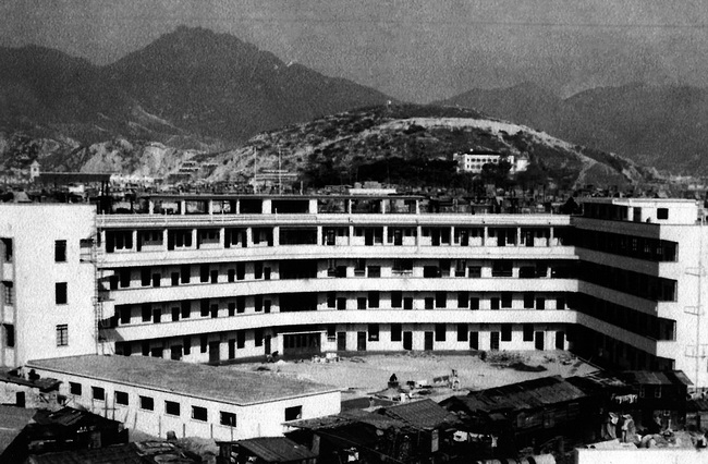 中文（香港）: 1956年的聖芳濟書院